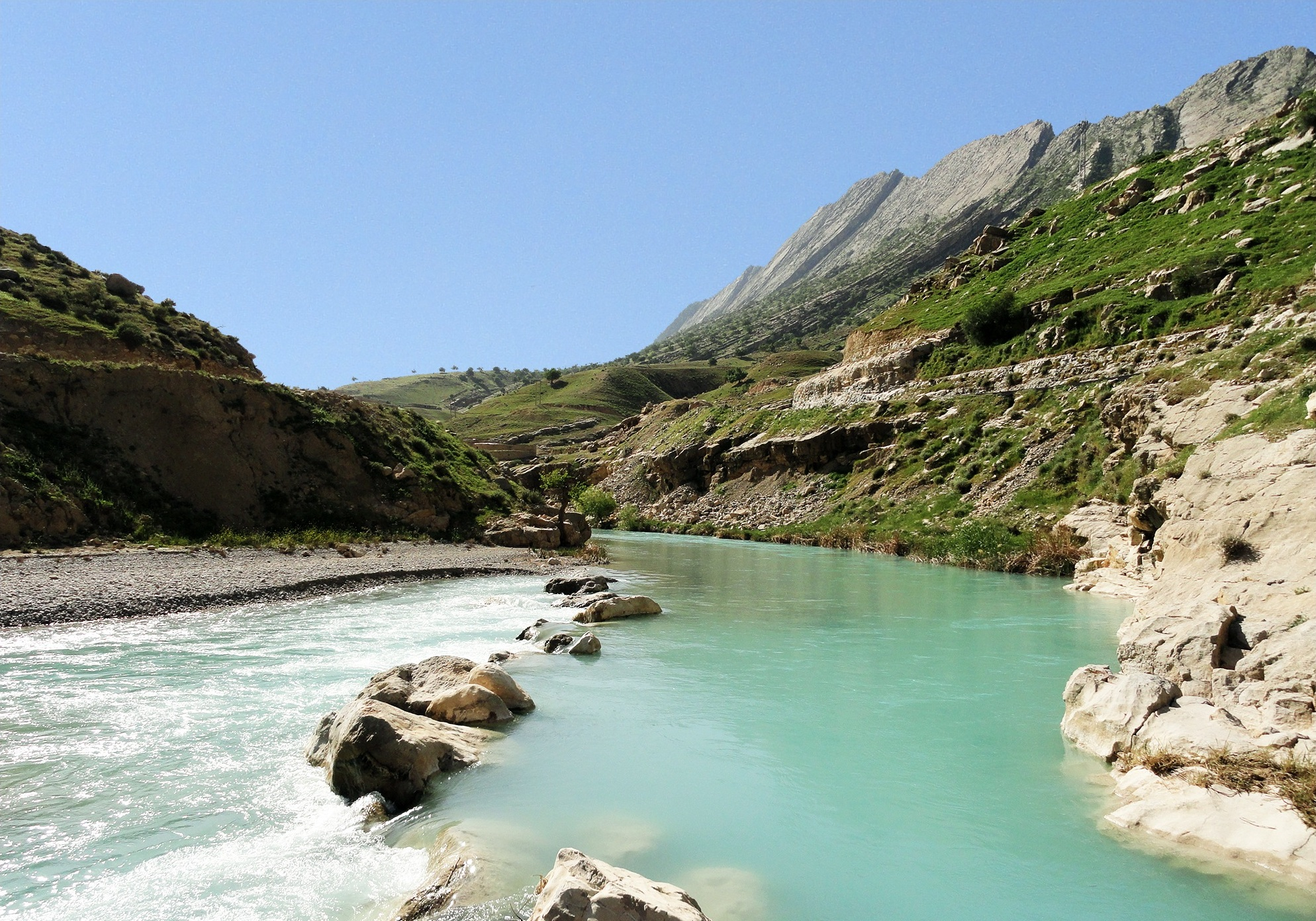 Shah Bahram River, Basht- Choram Rd. رود شاه‌بهرام، جاده باشت- چرام